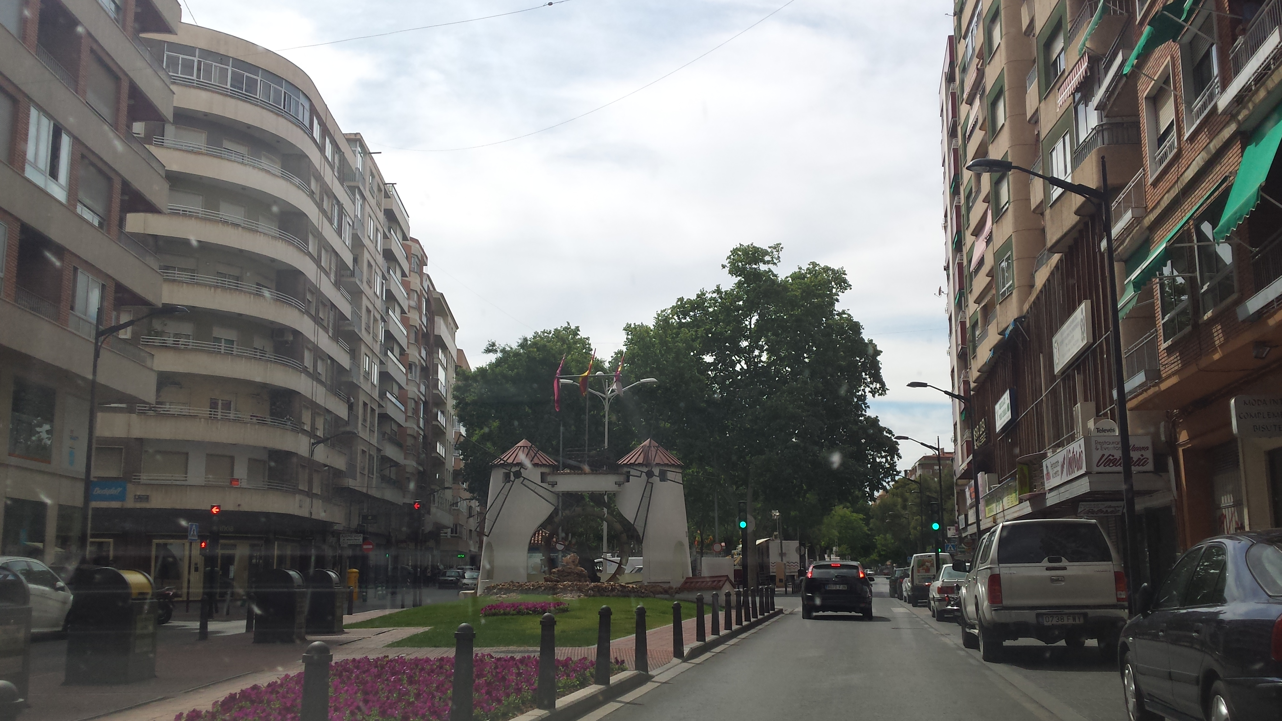 Molino de la Feria. Calle de la Feria. Albacete